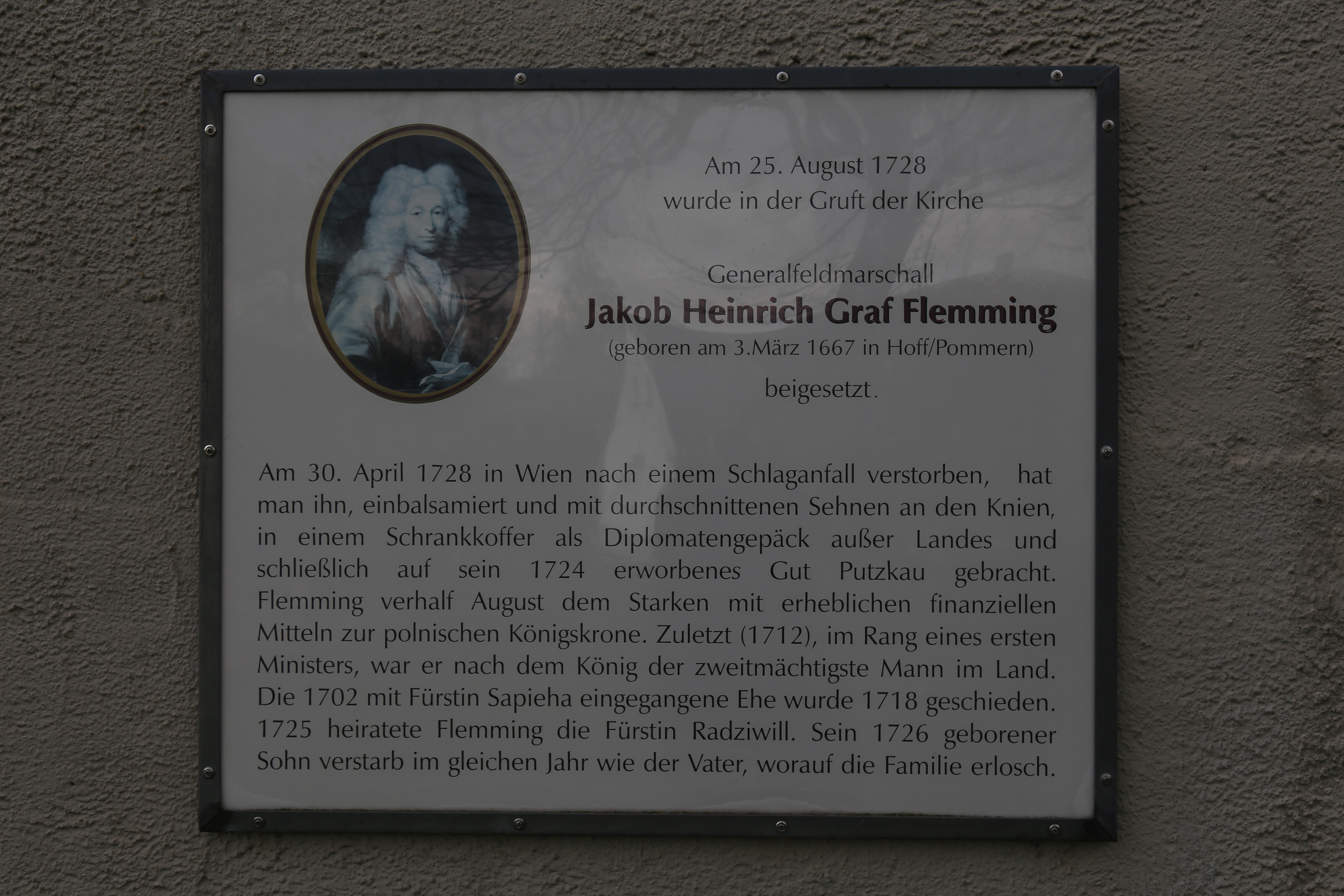 Marienkirche Putzkau April 2017 (12)